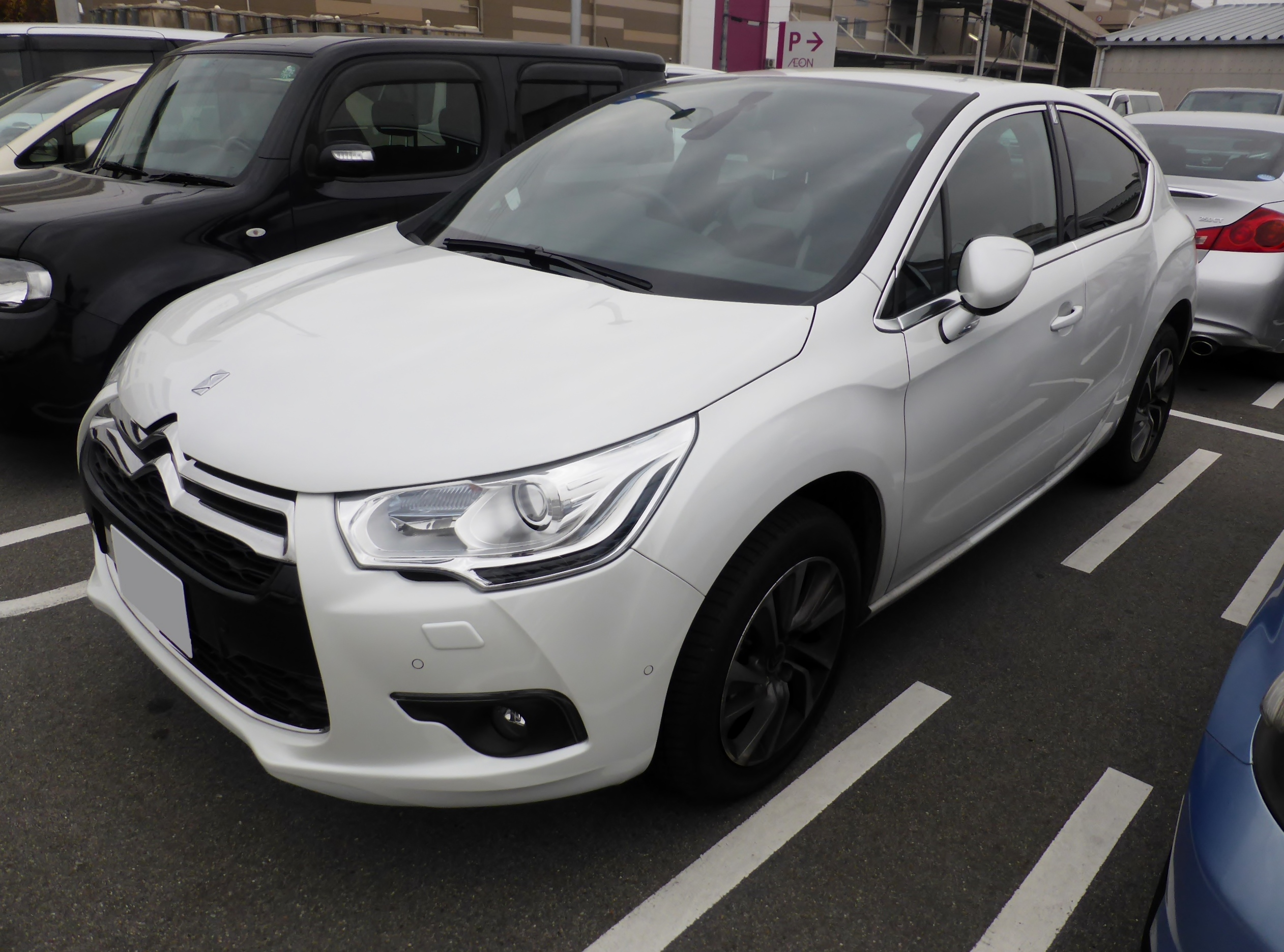 シトロエン・DS4シックをフロントから撮影。